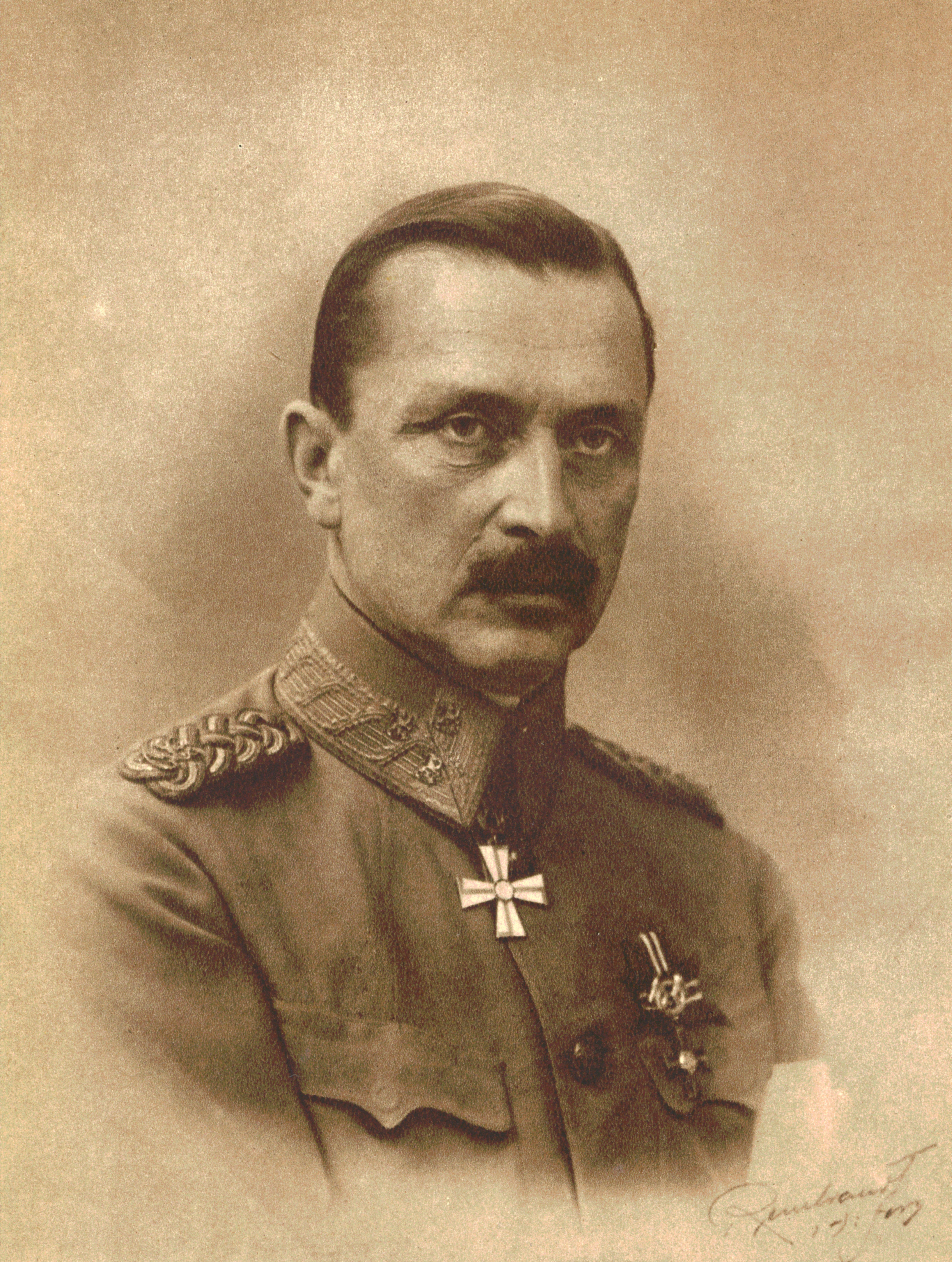 Ratsuväenkenraali Mannerheim